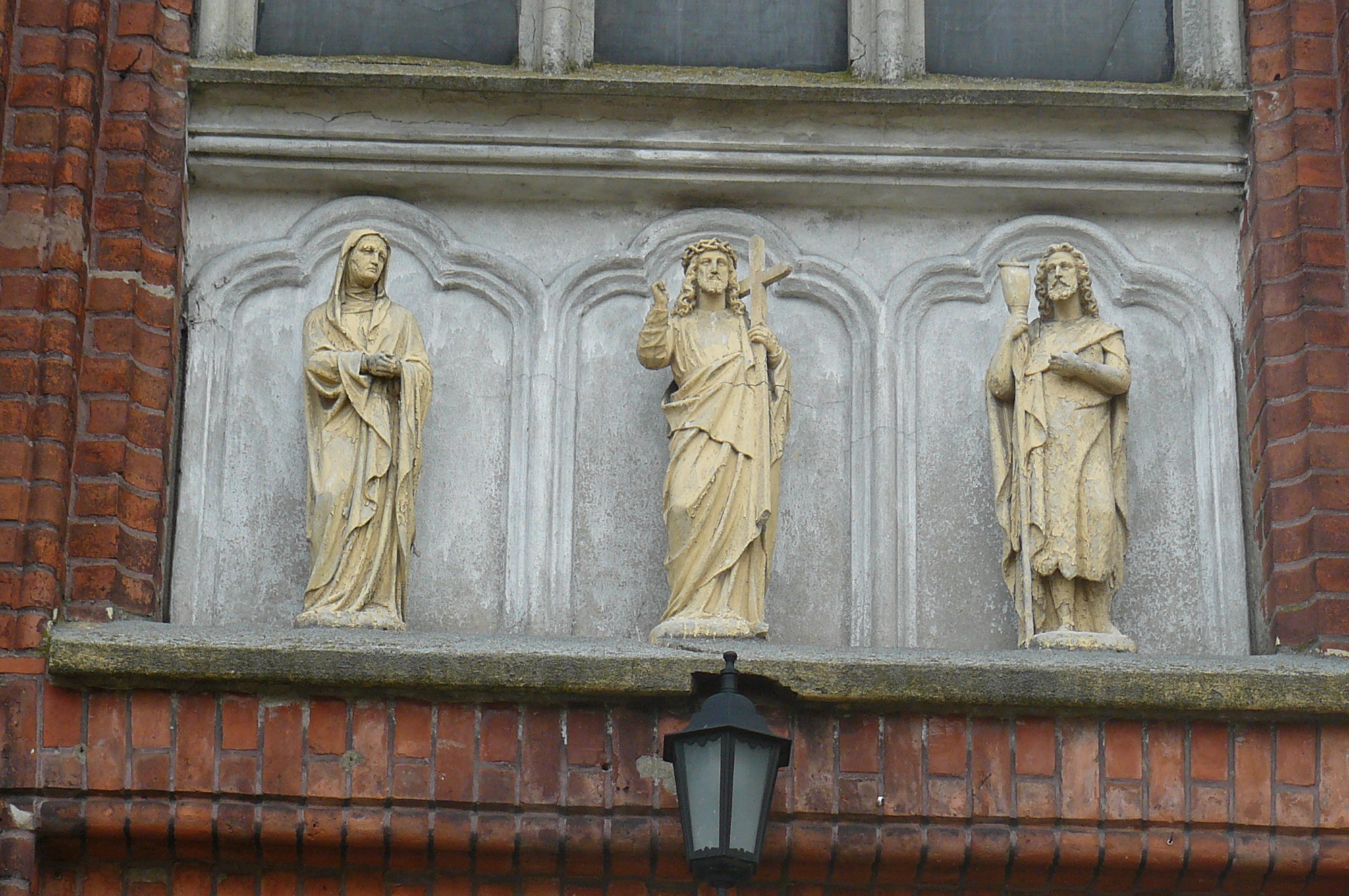 Rzeźby nad portalem kościoła w Ludomach.